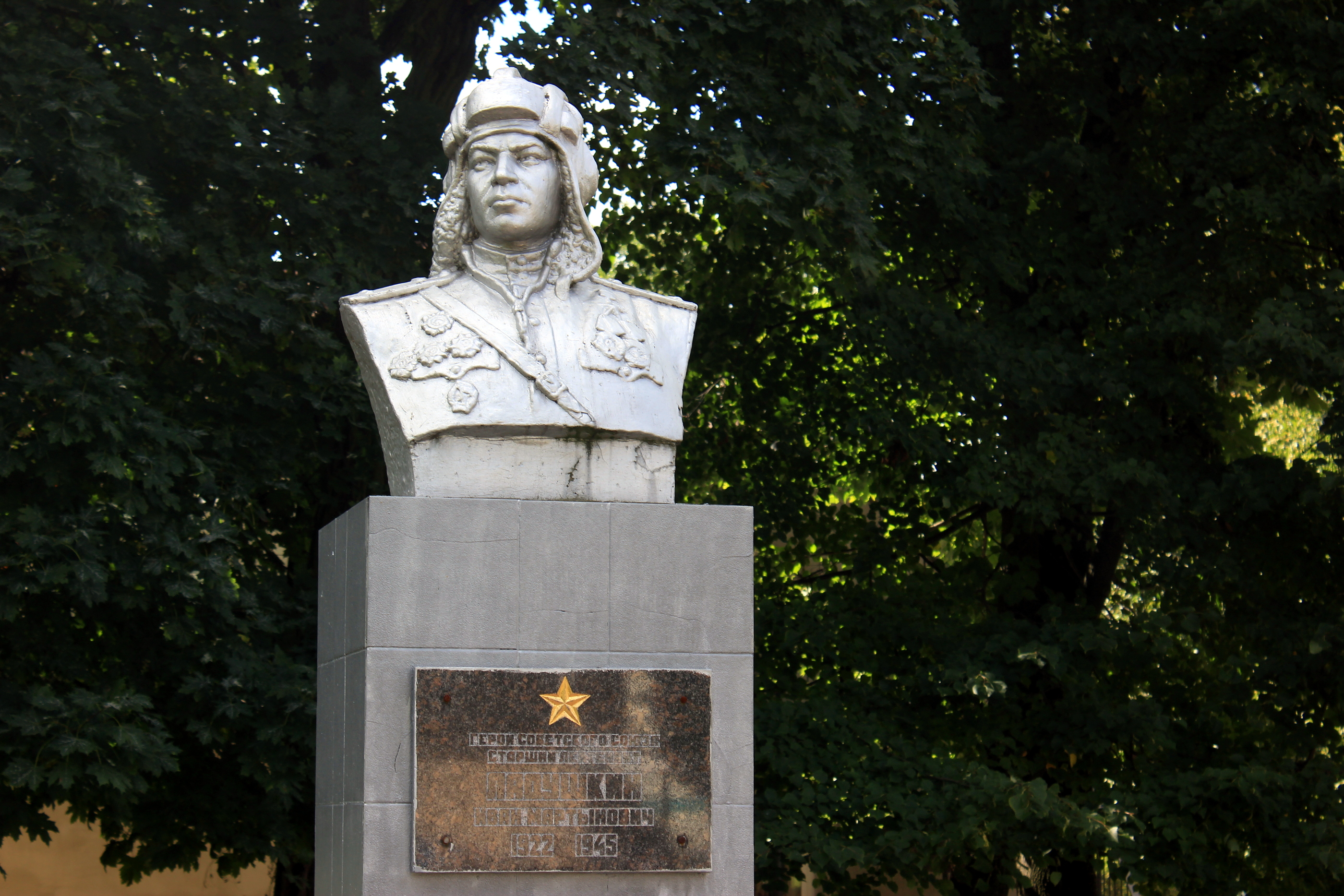 Denkmal für Iwan Laduschkin in Laduschkin (Ludwigsort), Kaliningrader Oblast.